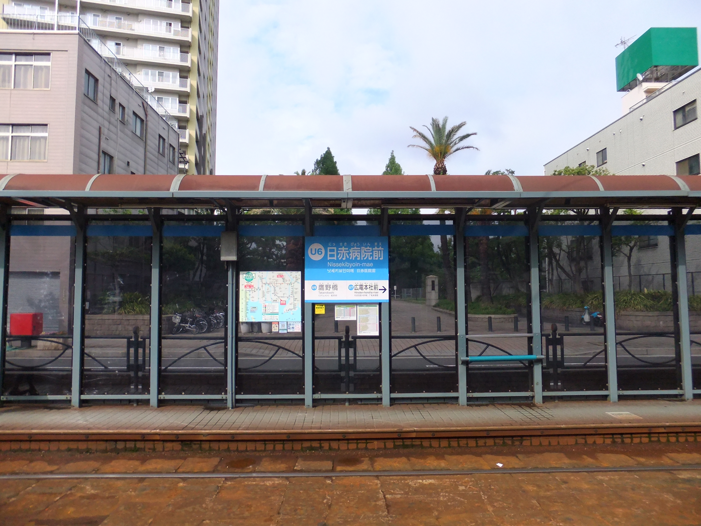 日赤病院前駅